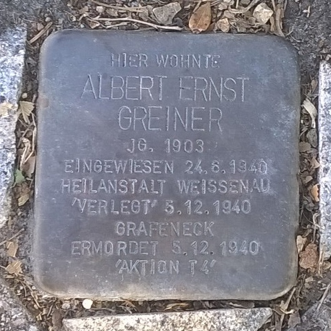 Stolperstein f. Albert Ernst Greiner in D-74392 Freudental, Pforzheimer Str. 25